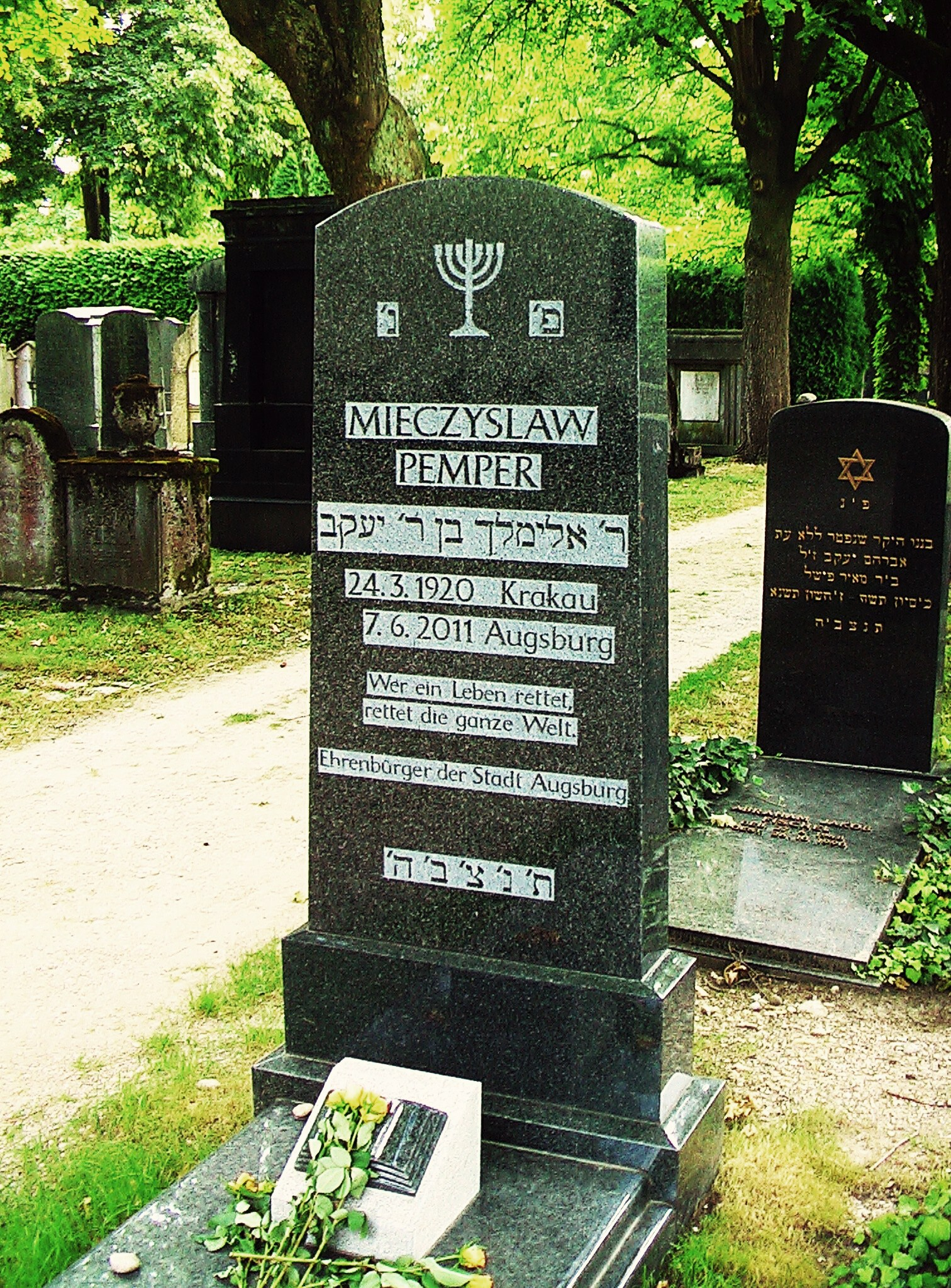 Grabstein von Mieczysław „Mietek“ Pemper am jüdischen Friedhof Augsburg Hochfeld